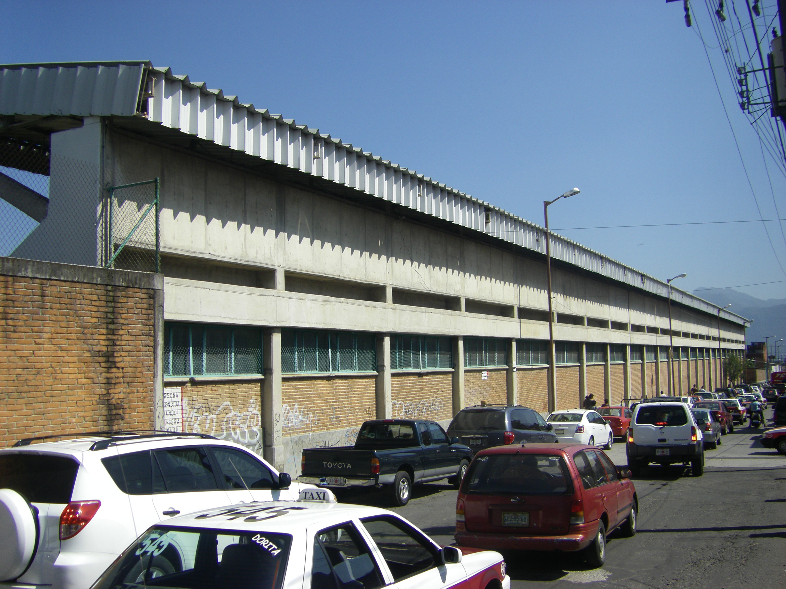 Haupttribüne Estadio Socum, Orizaba